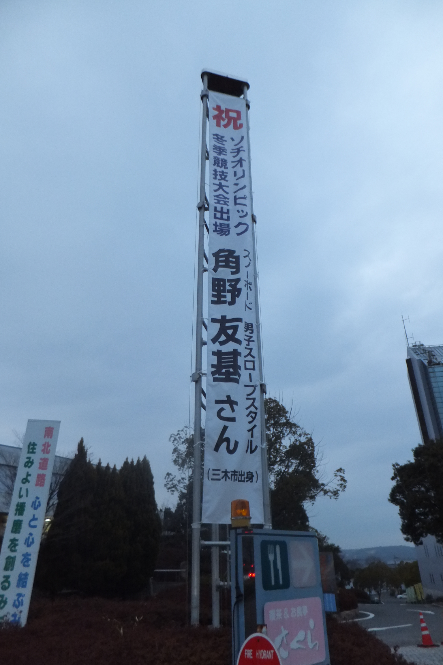 角野友基選手のソチオリンピック出場記念の垂れ幕